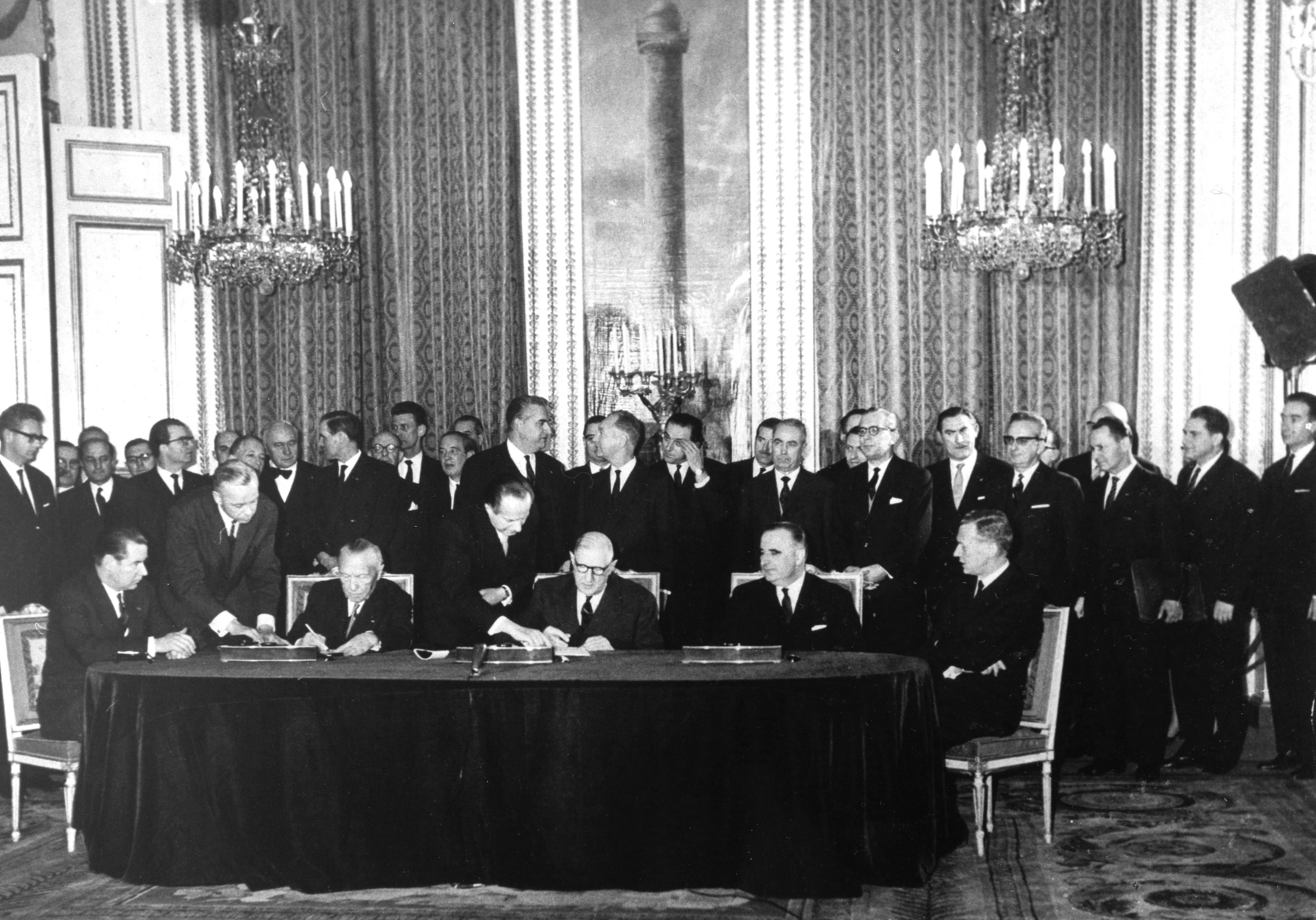 Bundeskanzler Konrad Adenauer und der französische Staatspräsident Charles de Gaulle unterzeichneten am 22.1.1963 im Pariser Elysée-Palast einen Vertrag über die deutsch-französische Zusammenarbeit, der politische Konsultationen beider Regierungen und eine verstärkte Zusammenarbeit in der Außen- und Verteidigungspolitik sowie in Erziehungs- und Jugendfragen festgelegt. Regelmäßige Treffen zwischen den Regierungschefs und den zuständigen Ressortministern beider Länder sollen die praktische Durchführung des Vertrages gewährleisten. Im Bild (v.l.n.r.) am Tisch: Bundesminister des Auswärtigen, Dr. Gerhard Schröder, Bundeskanzler Konrad Adenauer, Staatspräsident Charles de Gaulle, Premierminister Georges Pompidou und der französische Außenminister Maurice Couve de Murville